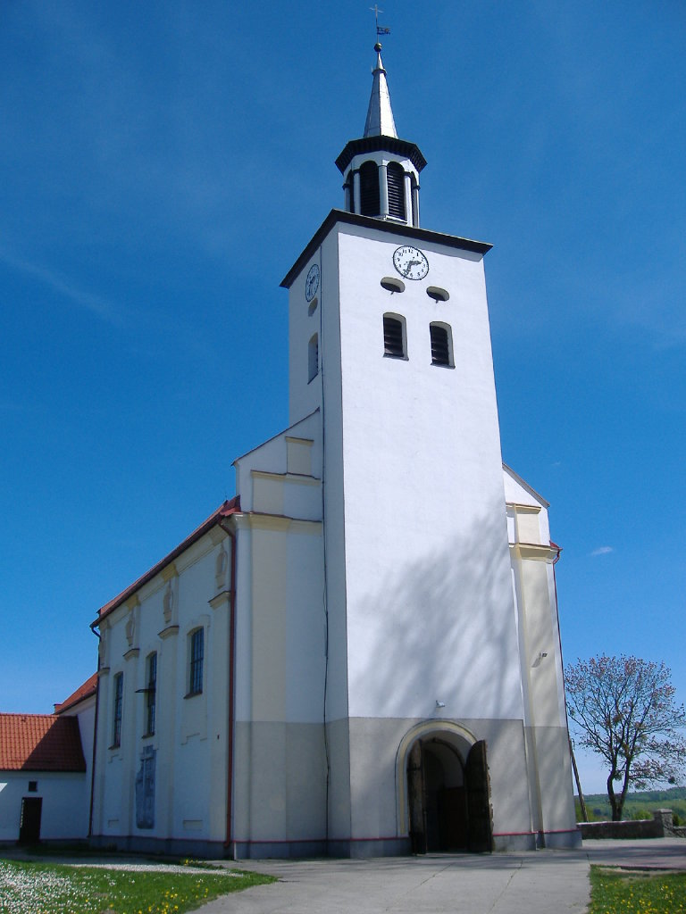 Kościół pod wezwaniem Św. Wawrzyńca w Luzinie